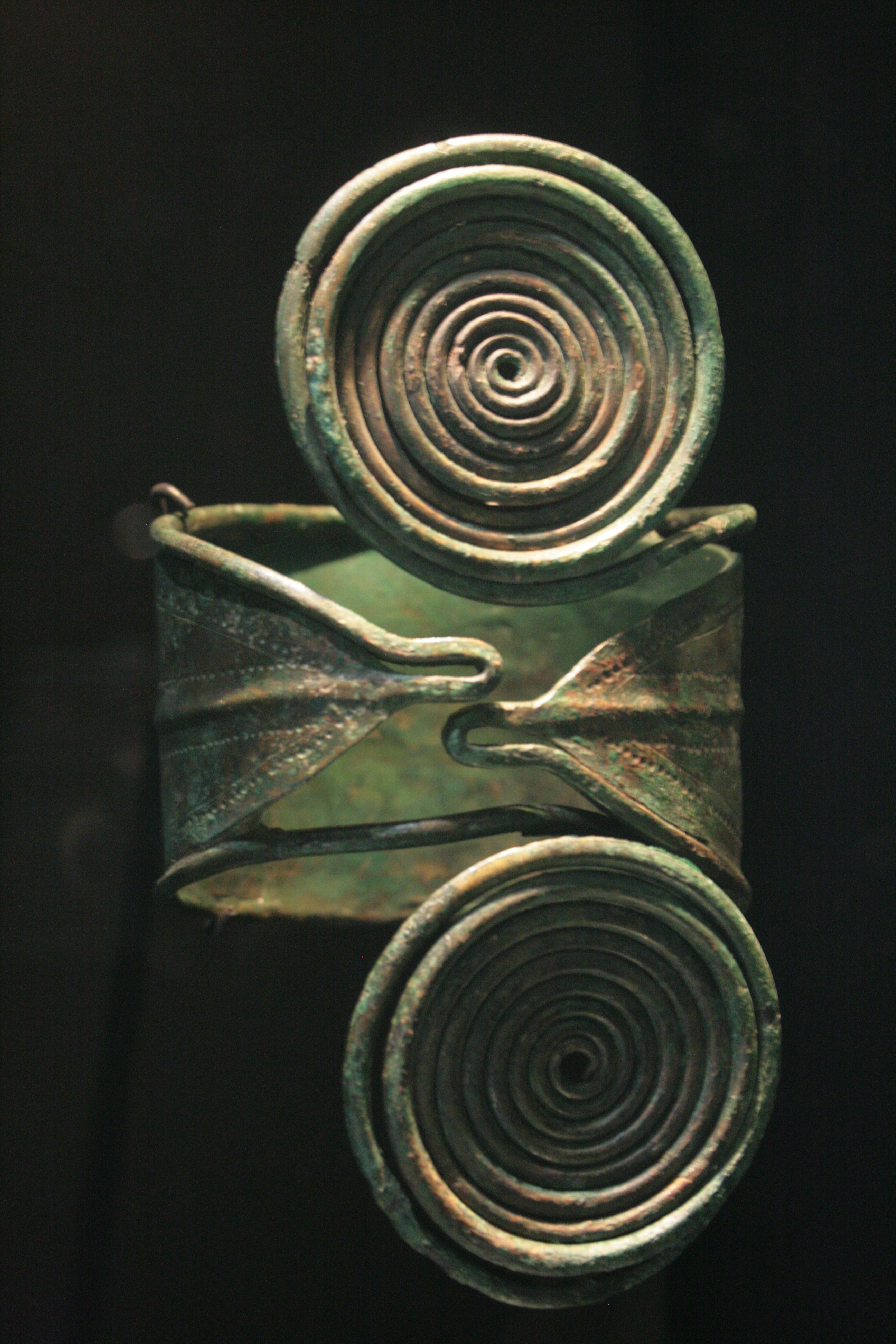 Keltisch Armband, Landesmuseum Württemberg. Beigabe des Frauengrabes 4, Gönningen. 1.500 - 1.400 von Christus.